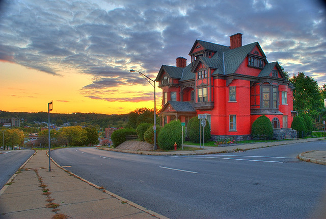 Greene Mansion, Amsterdam, NY.